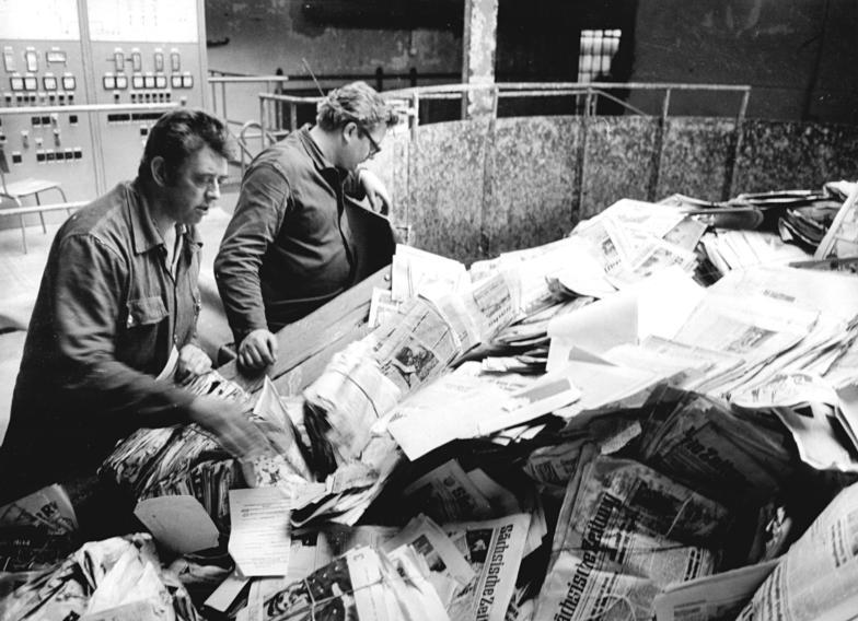 ADN-ZB-Häßler-14.4.80-la-Bez. Dresden: Täglich 75 Tonnen Altpapier werden im VEB Vereinigte Papierfabriken Heidenau aufbereitet und zu Toilettenpapier sowie zu hochwertigem Duplex-Tapetenrohpapier verarbeitet. In der ersten Verarbeitungsstufe wird der wertvolle Sekundärrohstoff zu einer Art Zellstoffbrei aufbereitet. Meister Günter Riedel (l) und Anlagenfahrer Rolf Unganz sind für die richtige Mischung der entsprechenden "Zutaten" verantwortlich.